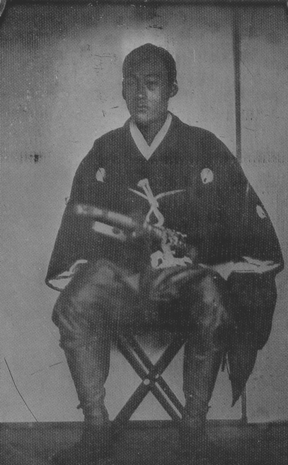 鍋島直大。Nabeshima Naohiro.